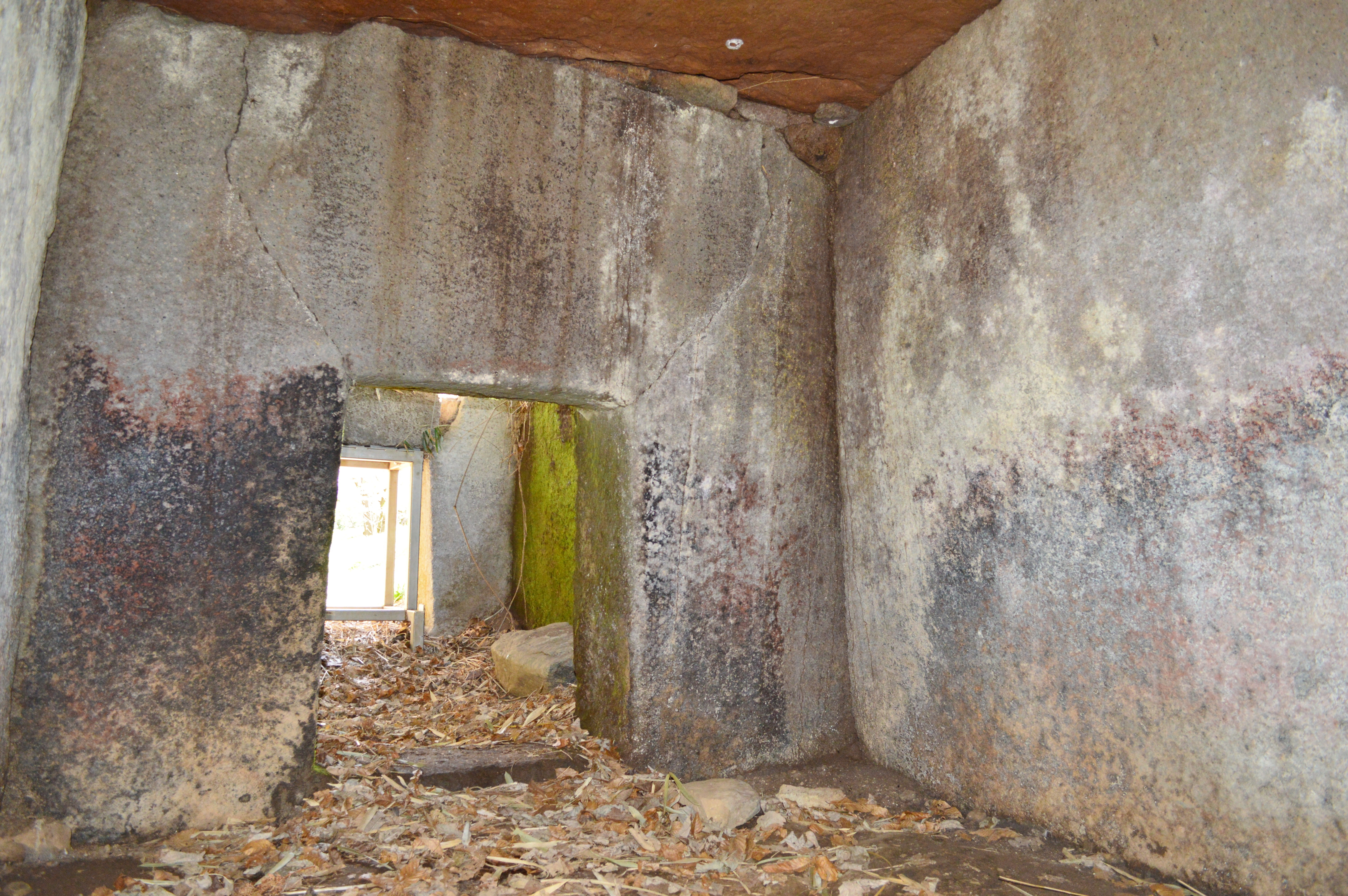 岩屋古墳 (米子市) 石室後室 Nikon D3200